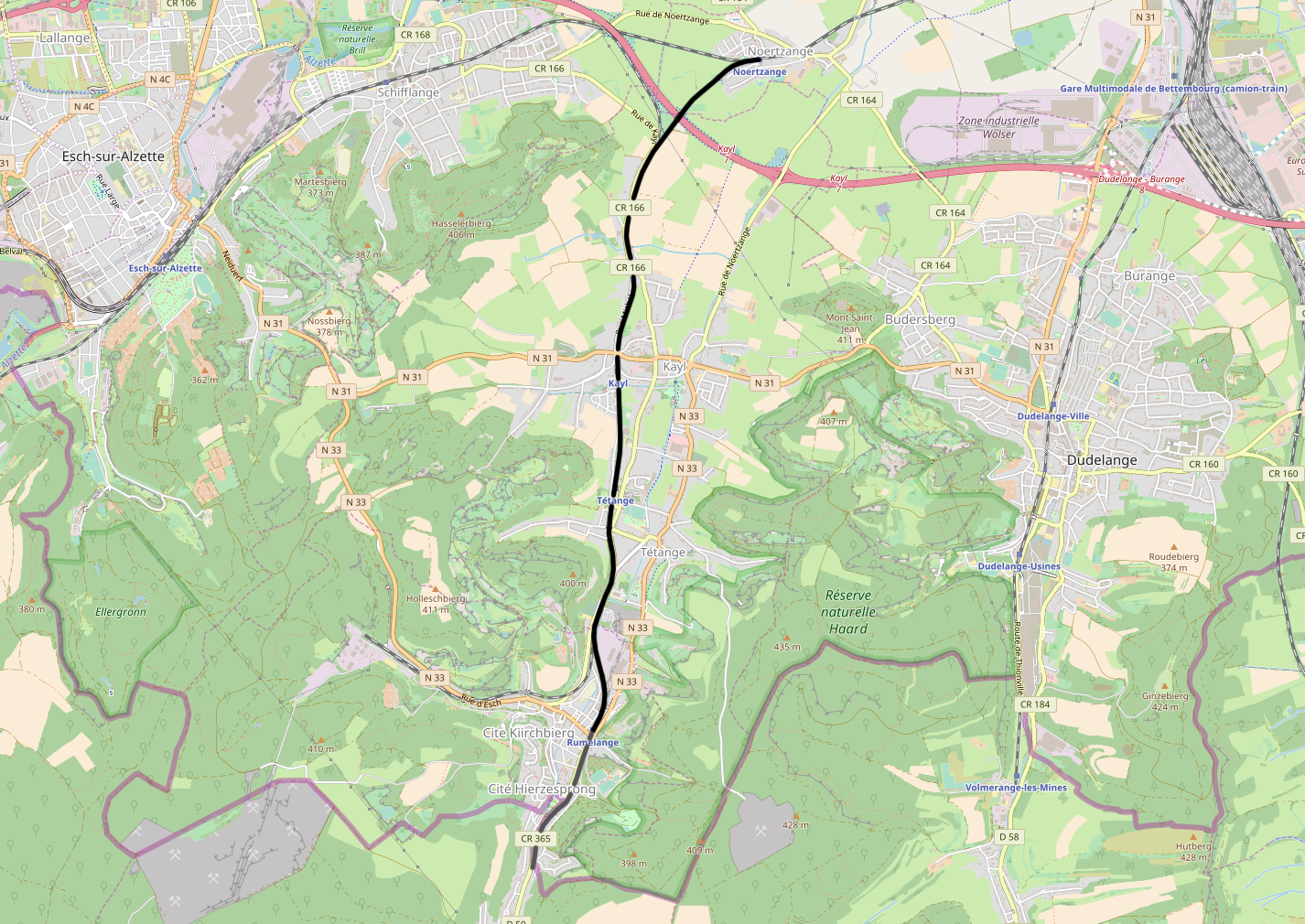 CFL line 6c, Noertzange - Rumelange-Ottange